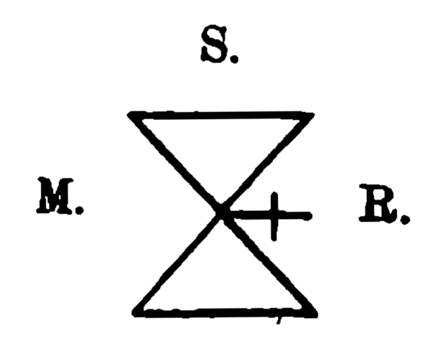 Mikkel Sørensen Ribers bomærke fra det nu forsvundne epitafium i Sæby Kirke.